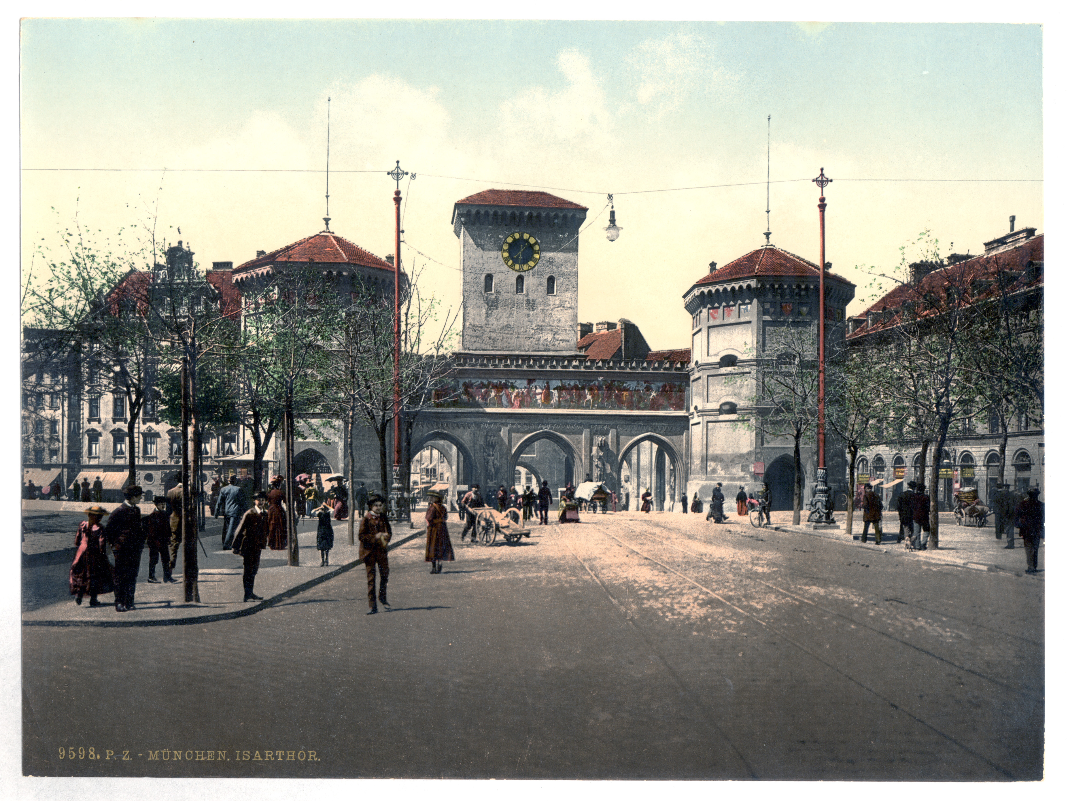 München Isartor